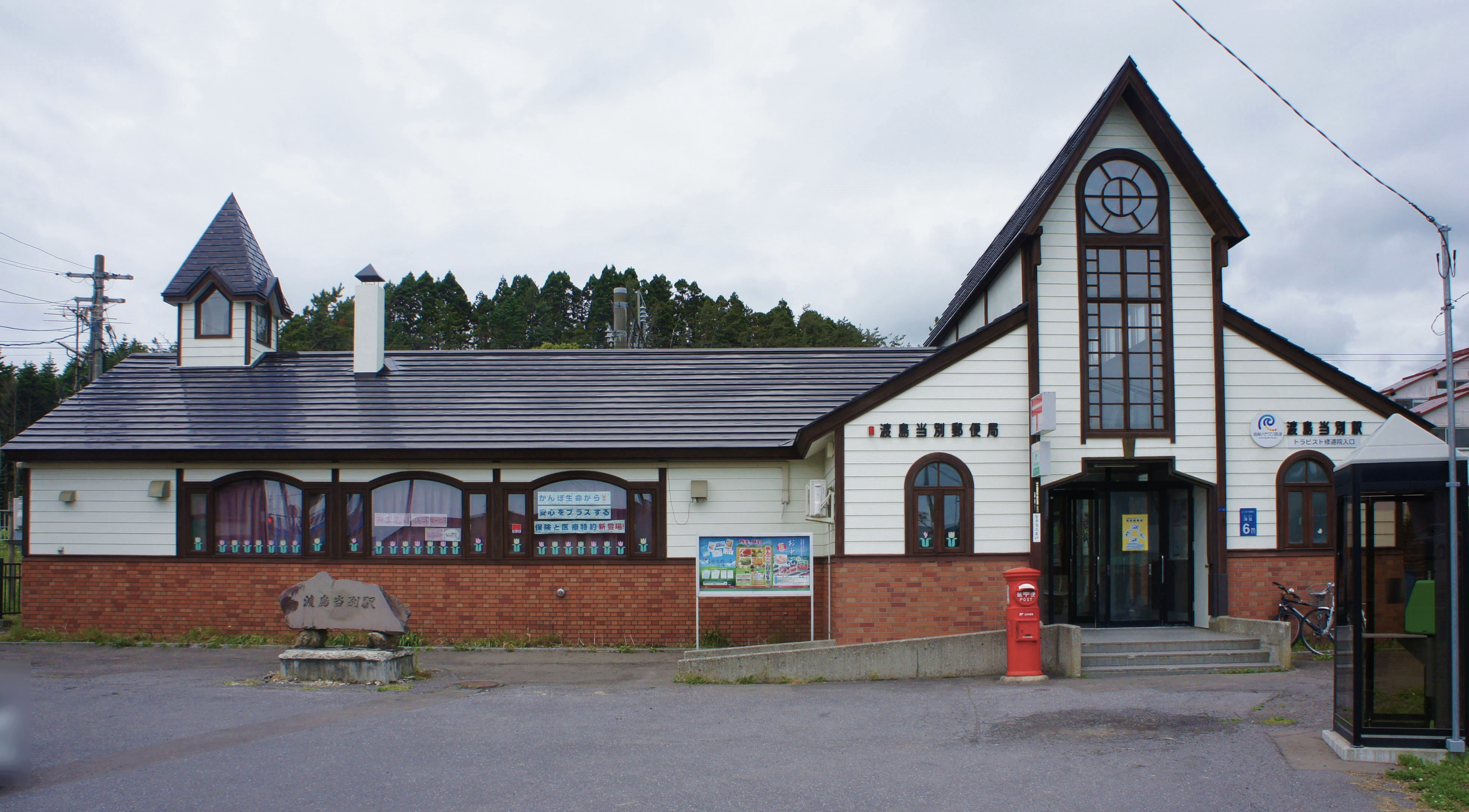 道南いさりび鉄道線・渡島当別駅の駅舎